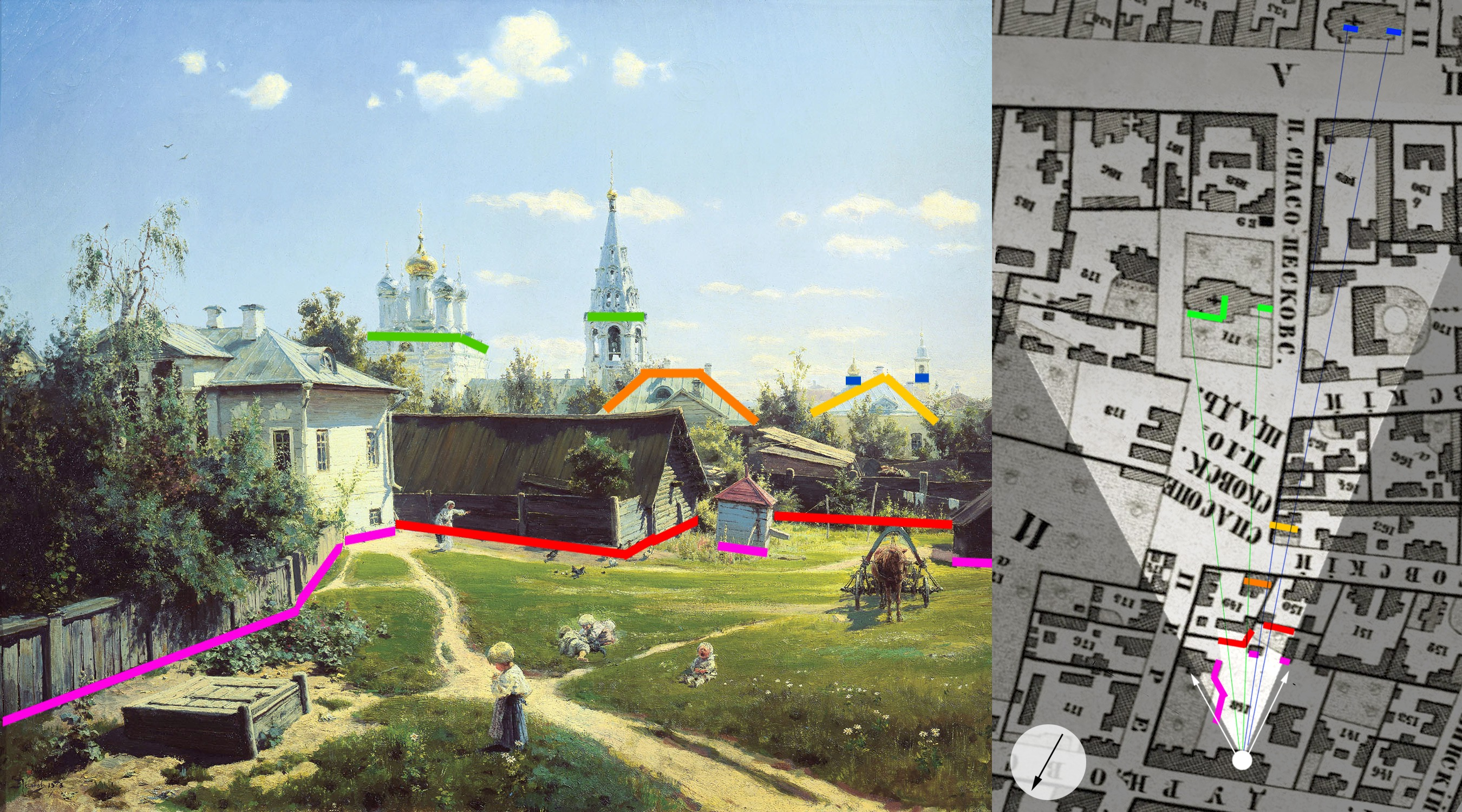 компиляция из двух источников